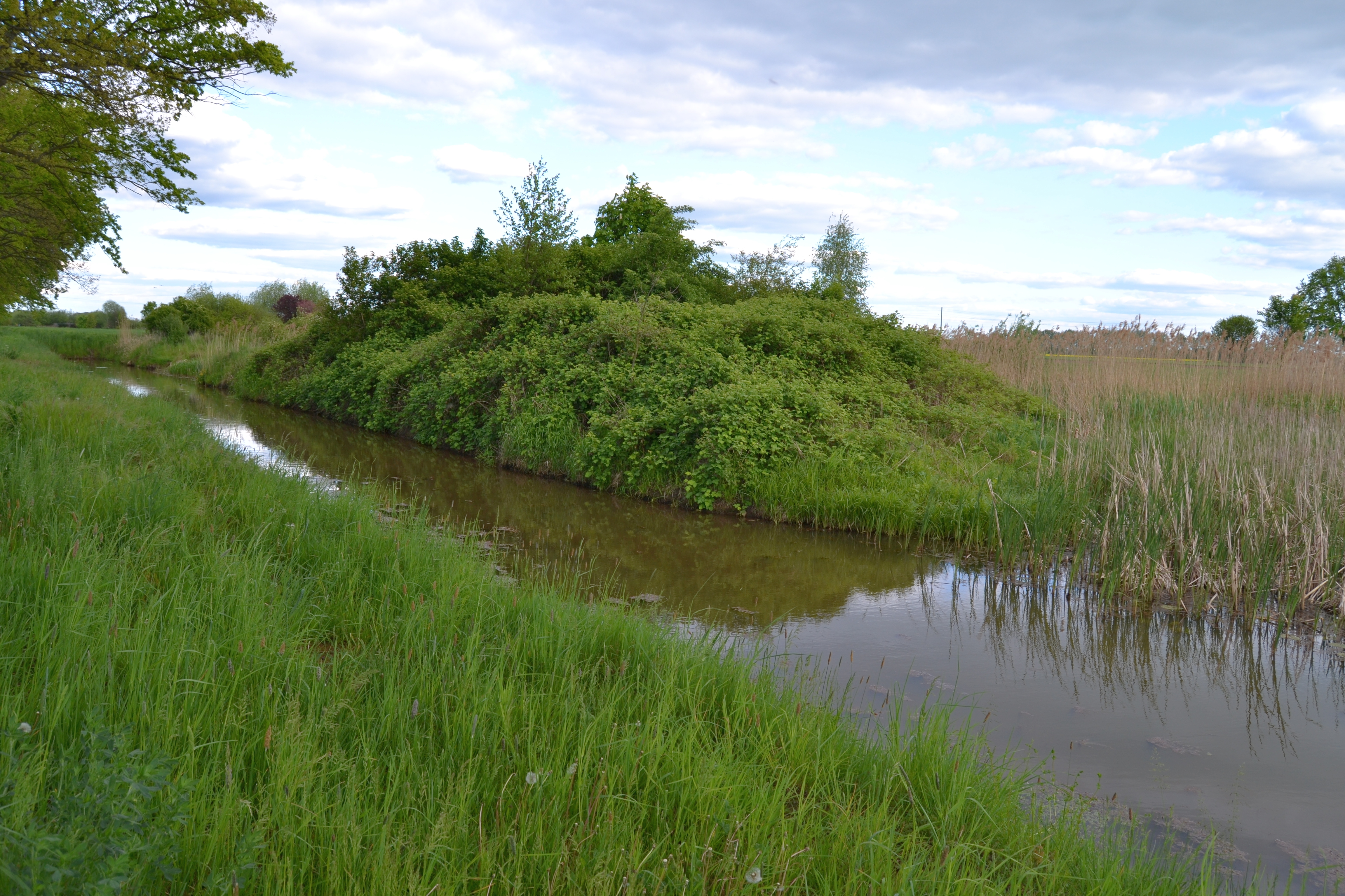 Graben und Teich an der Ortwiger Hauptstrasse, Gemeinde Letschin.